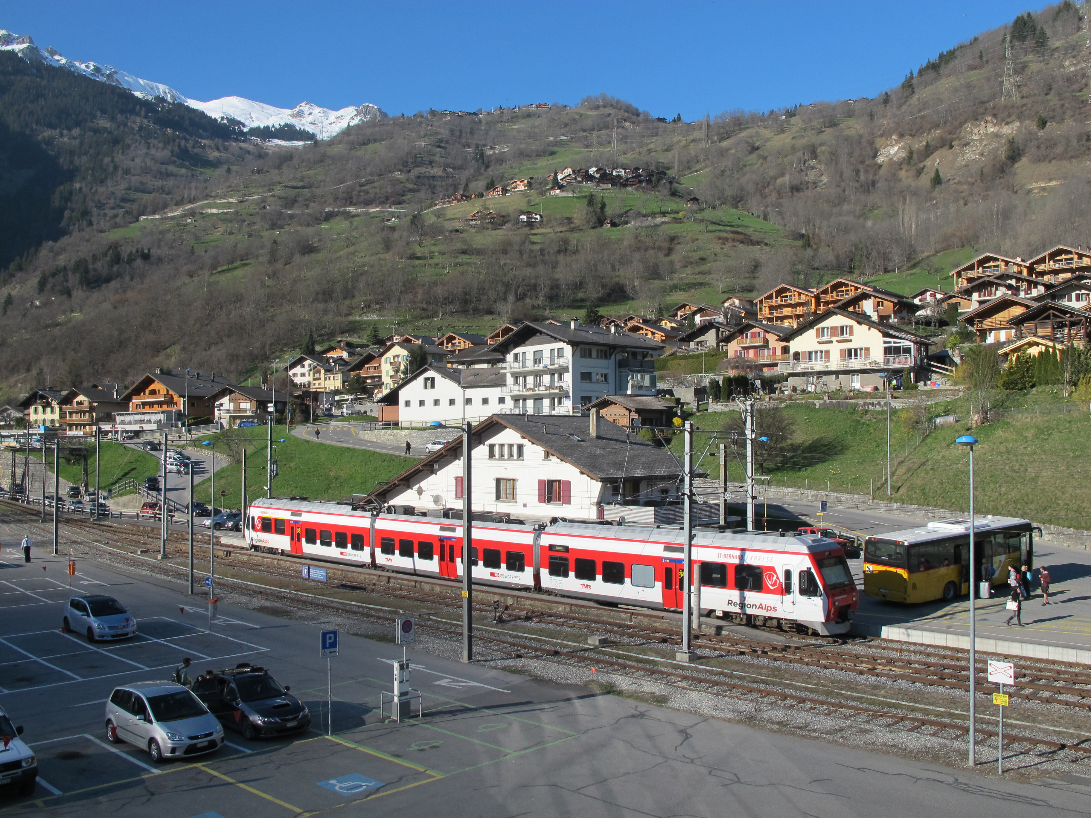 Station du Châble avec train MO.